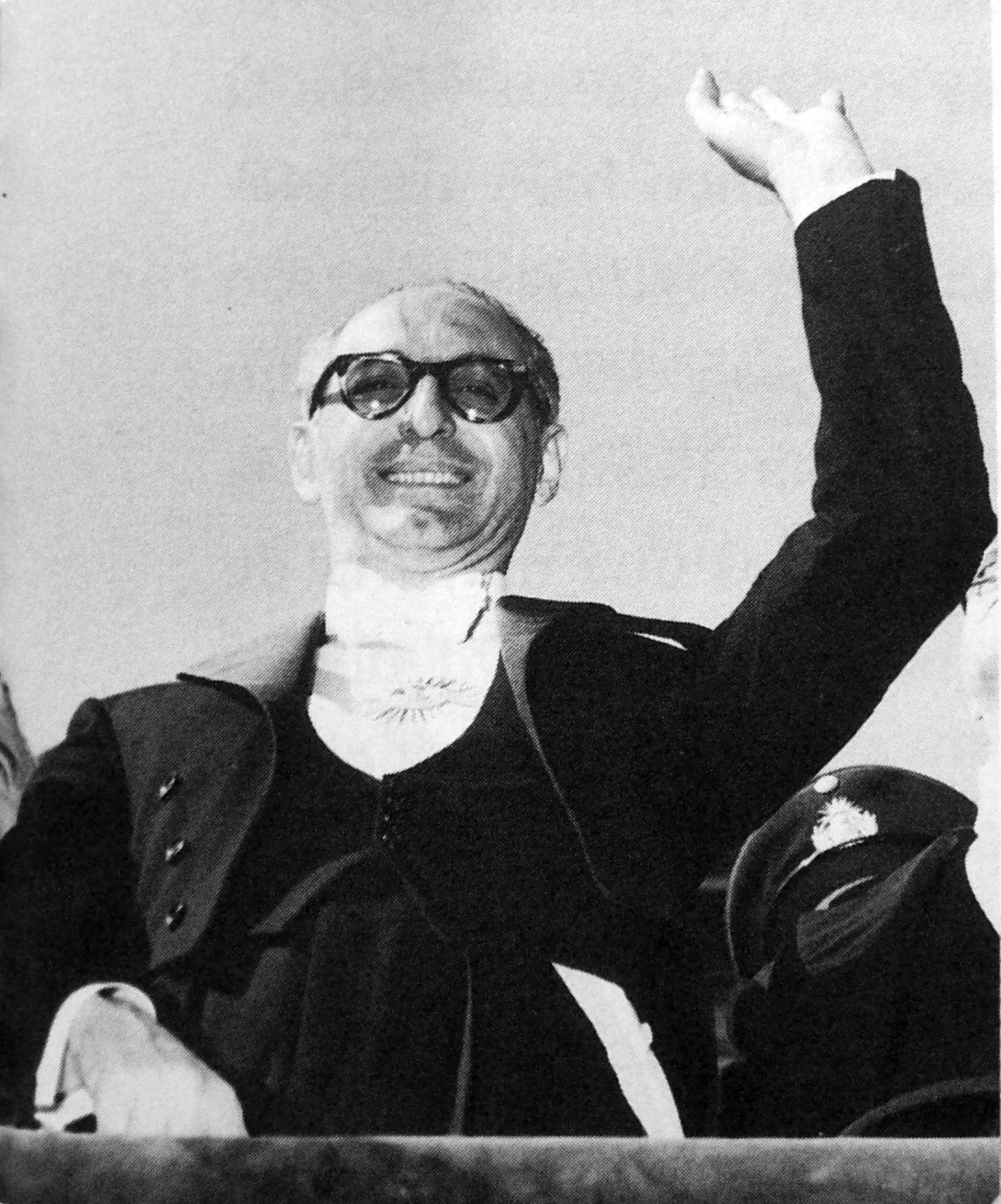 Es una foto del presidente Arturo Frondizi con la banda presidencial saludando a la gente.